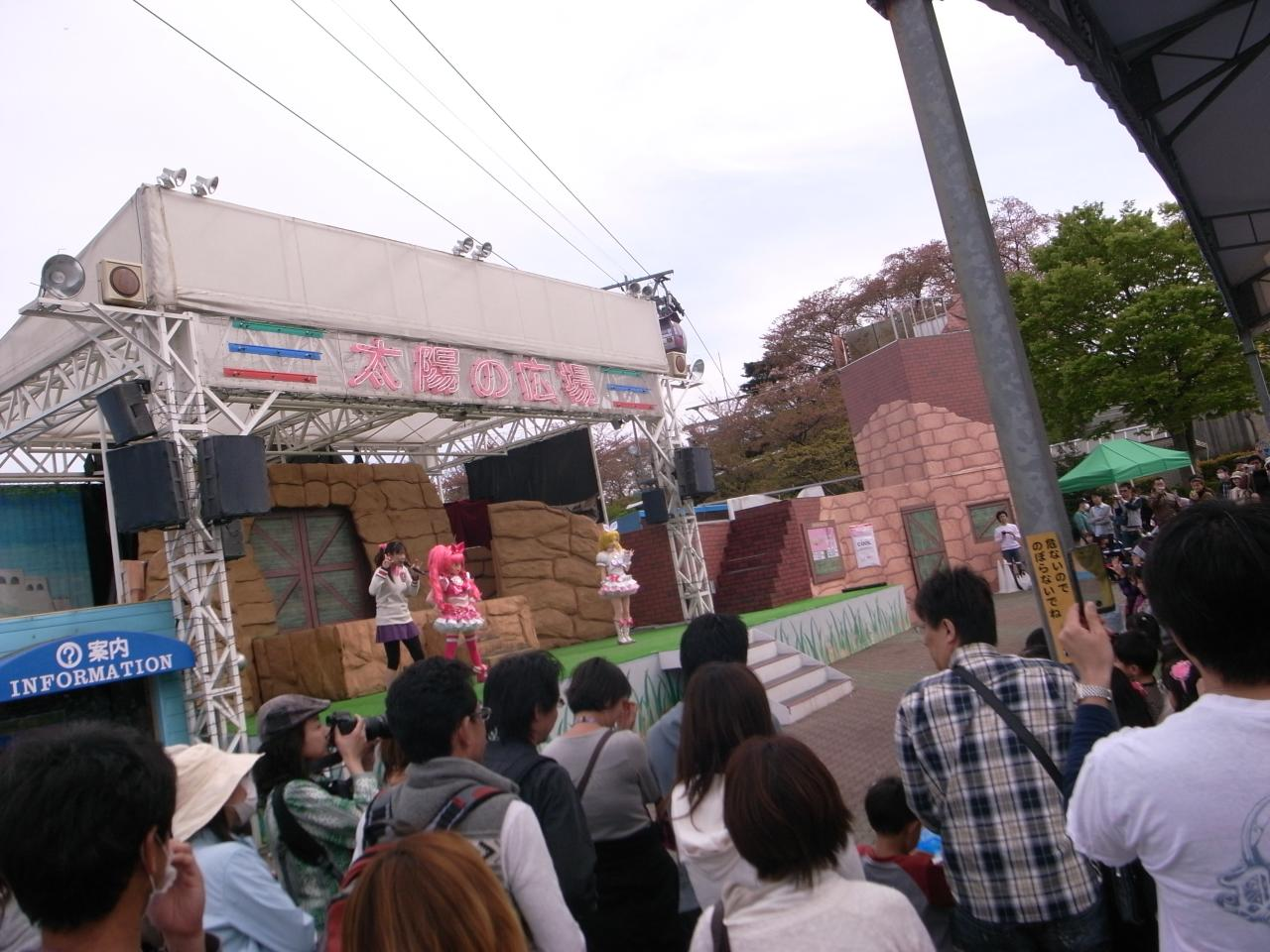 よみうりランドでショーをやってました